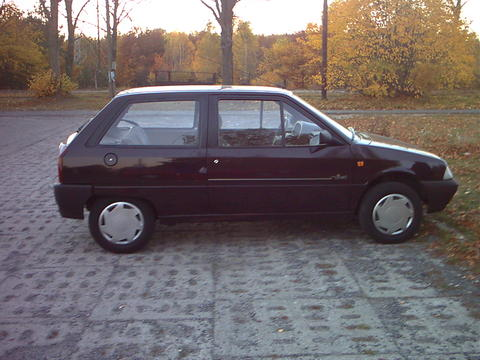 Citroen AX po modernizacji